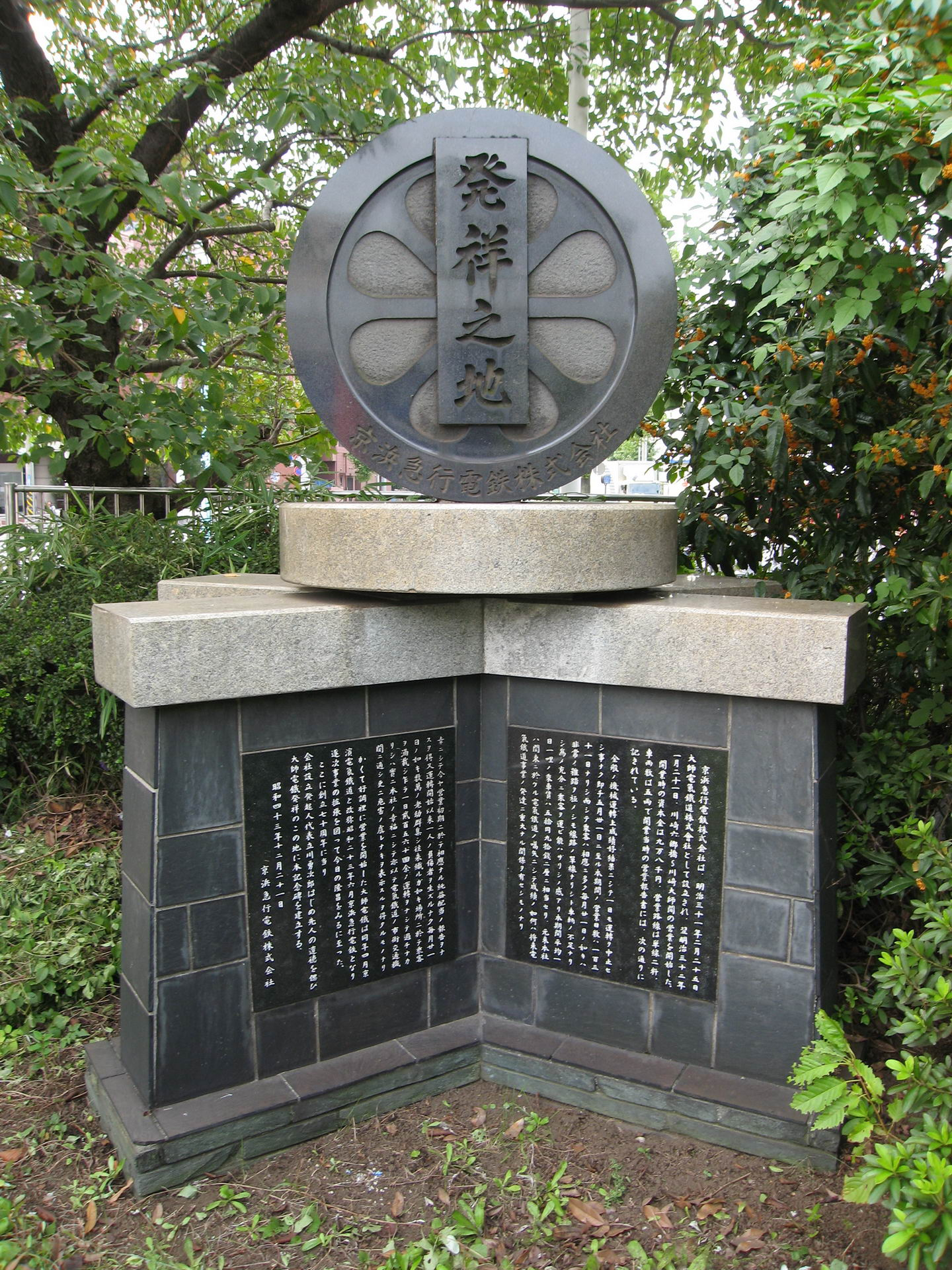 京浜急行発祥の地記念碑・川崎大師駅（川崎市川崎区） 2007年10月10日撮影 撮影者：Dddeco